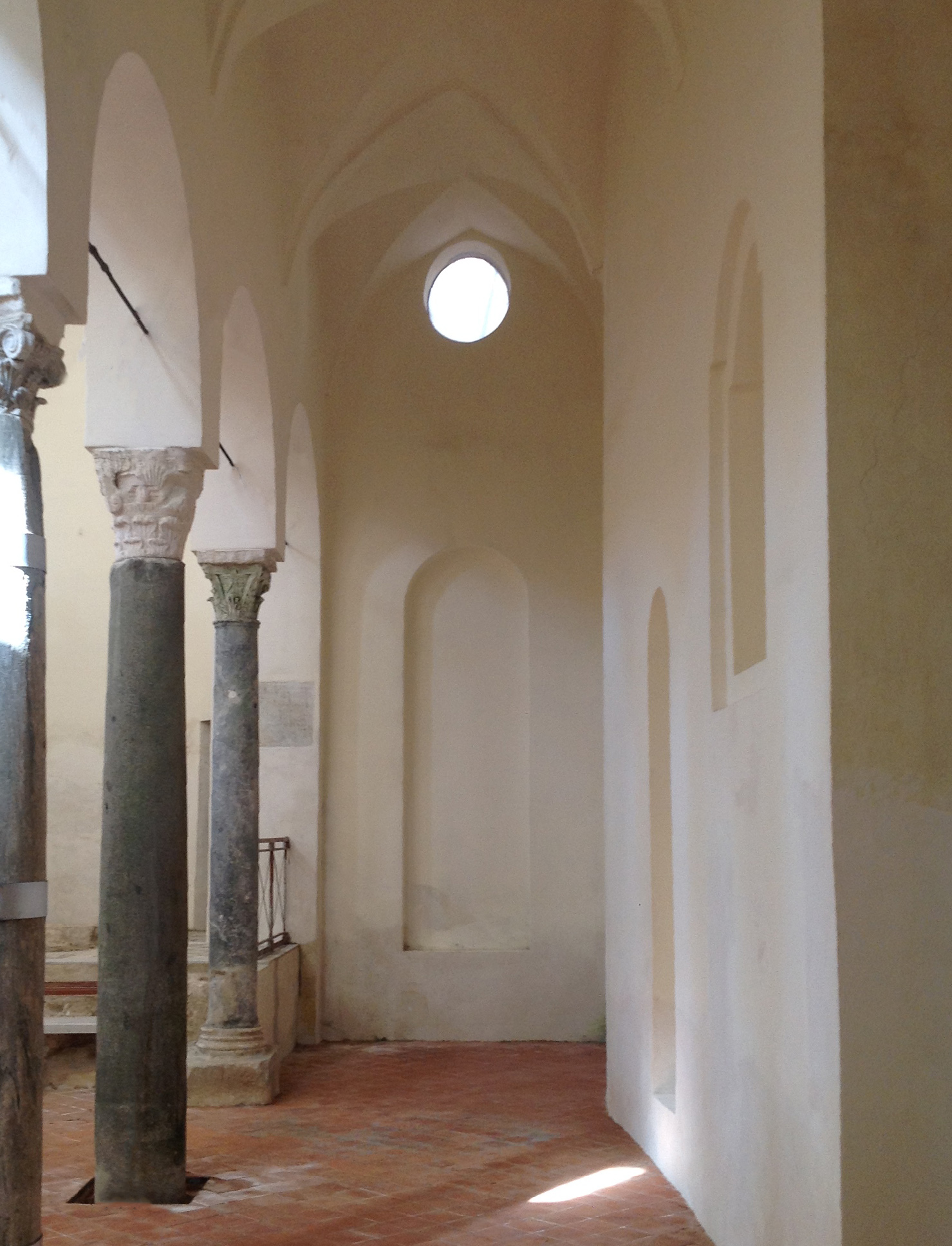 Interno della navata destra verso la parete di fondo.